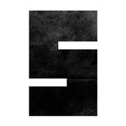 Spillestedet Stengades logo anno 2015